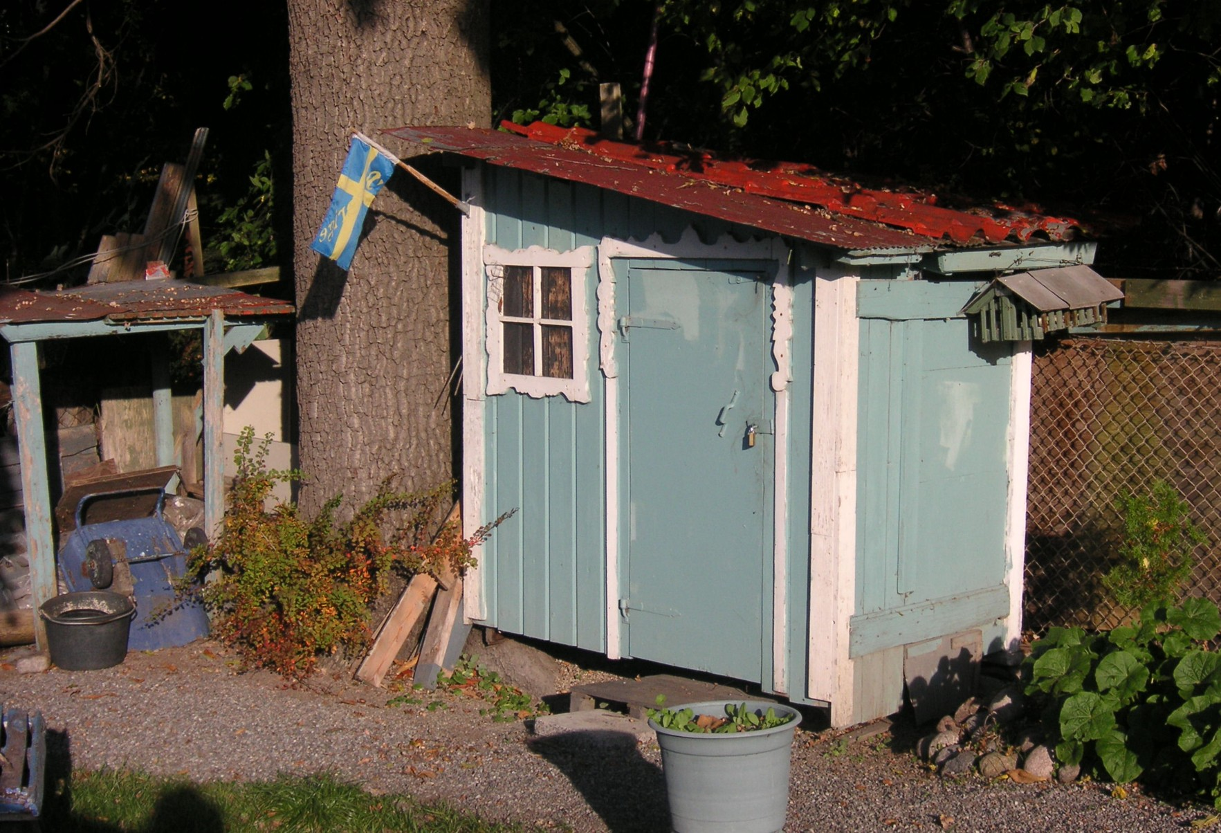 Kolonistuga